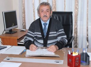 Тоҷикӣ: ДДФСТ ба номи М.Турсунзода